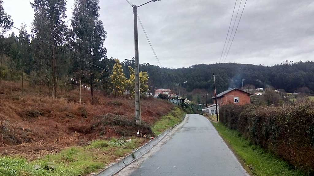 Vista de Faxín, Pedroso, Narón.